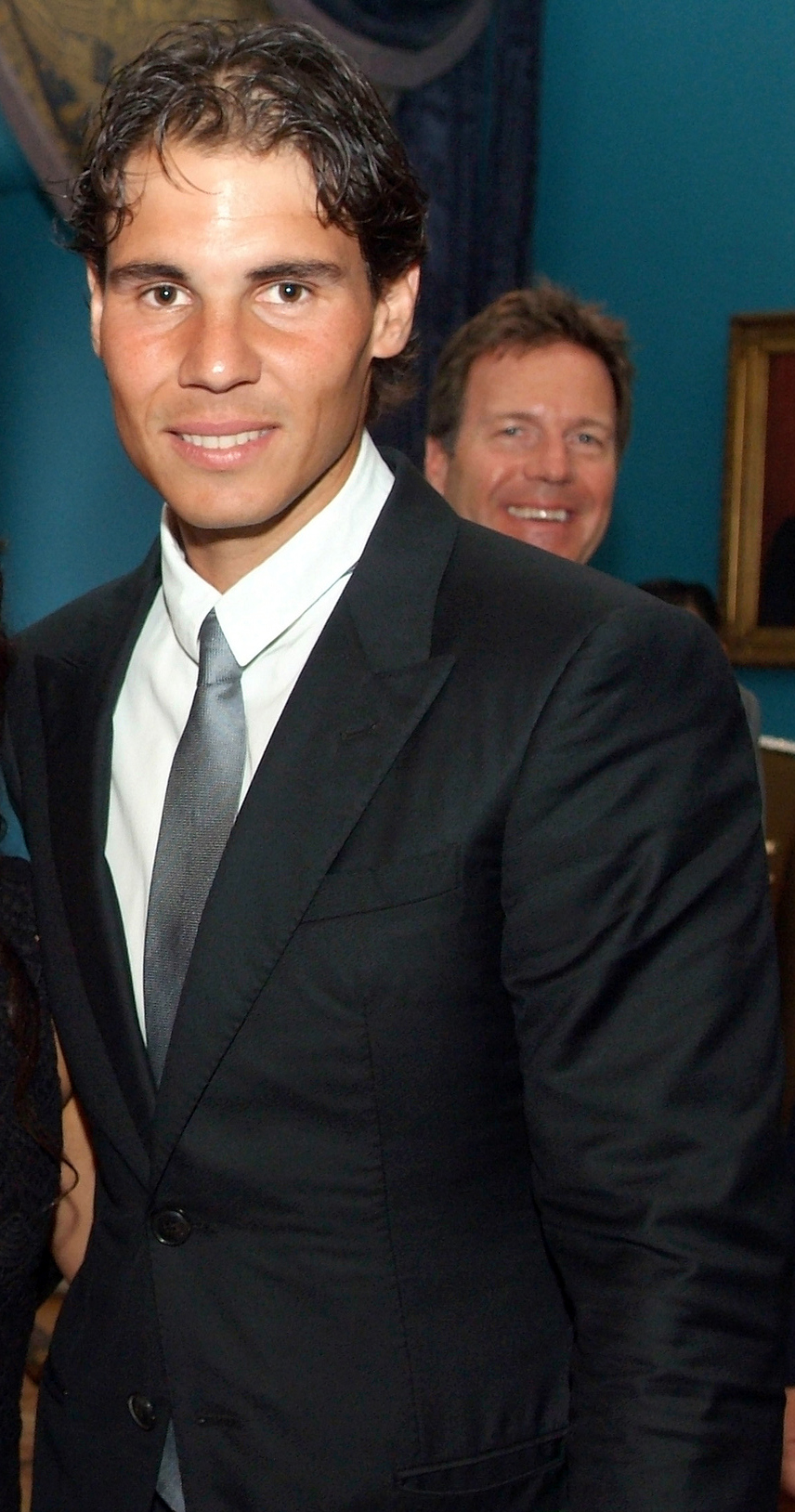 Rafael Nadal à La Moneda, Chili.